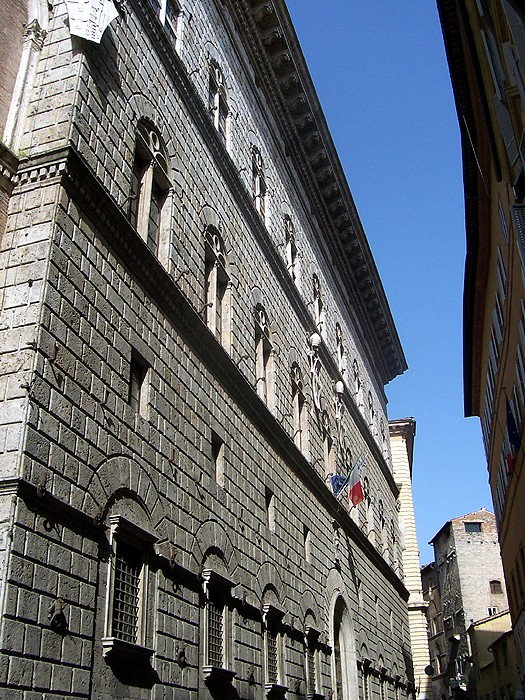 Siena - Palazzo Piccolomini (Archivio di Stato)